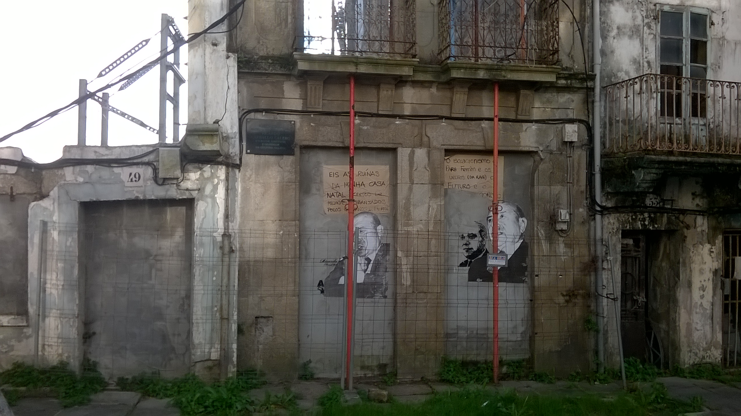 Casa natal, en ruínas, de Ricardo Carballo Calero, en Ferrol (A Coruña)